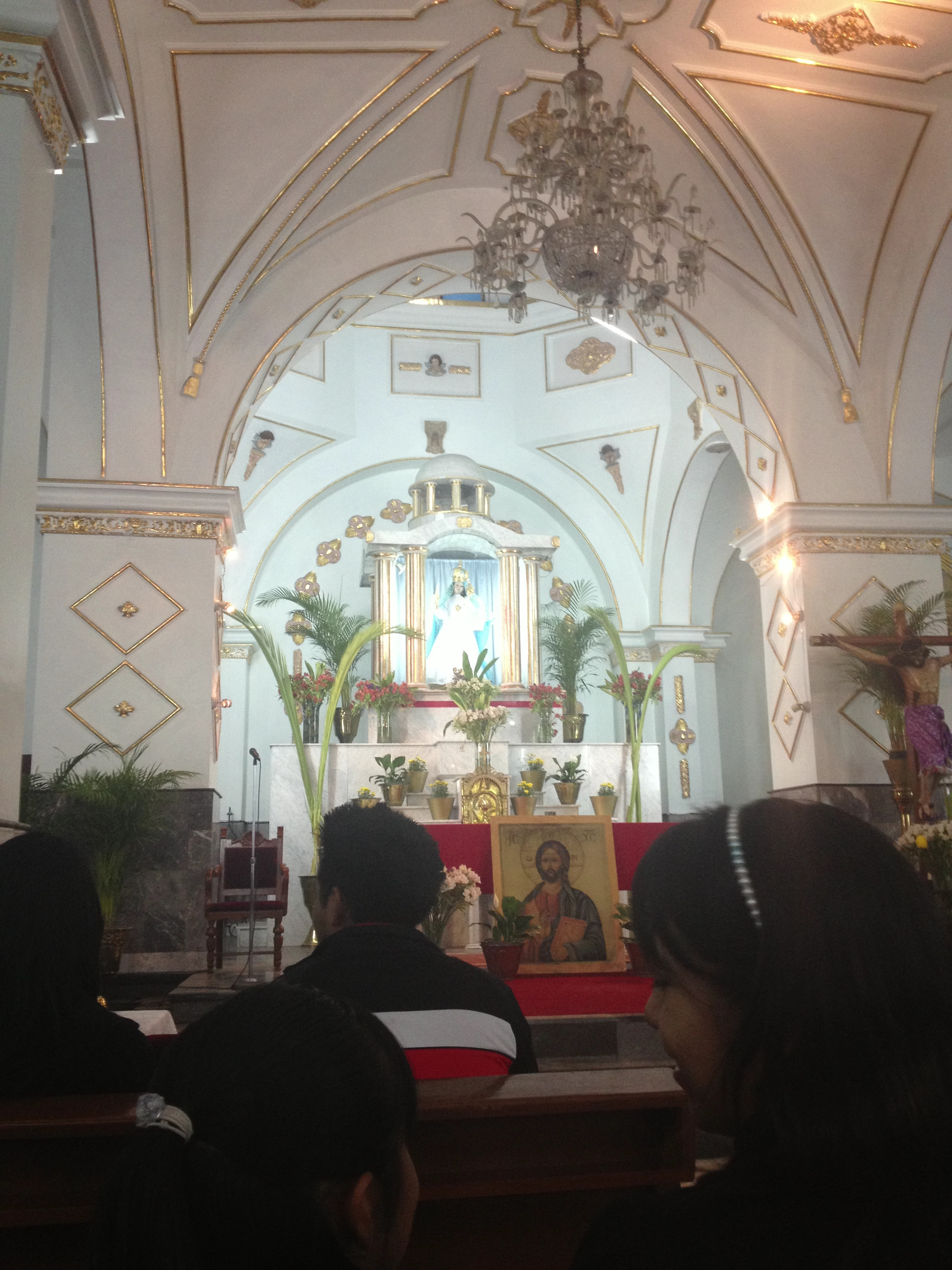 Detalle del Altar de la Parroquia de La Candelaria (Purificación de Nuestra Señora). Pueblo de La Candelaria, Coyoacán.